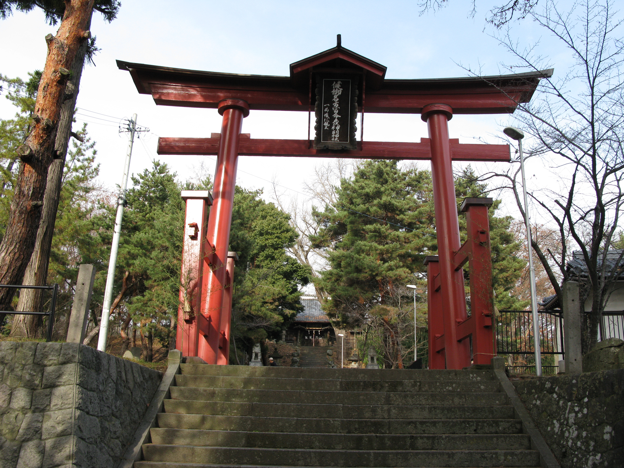 横山城跡（彦分別神社）